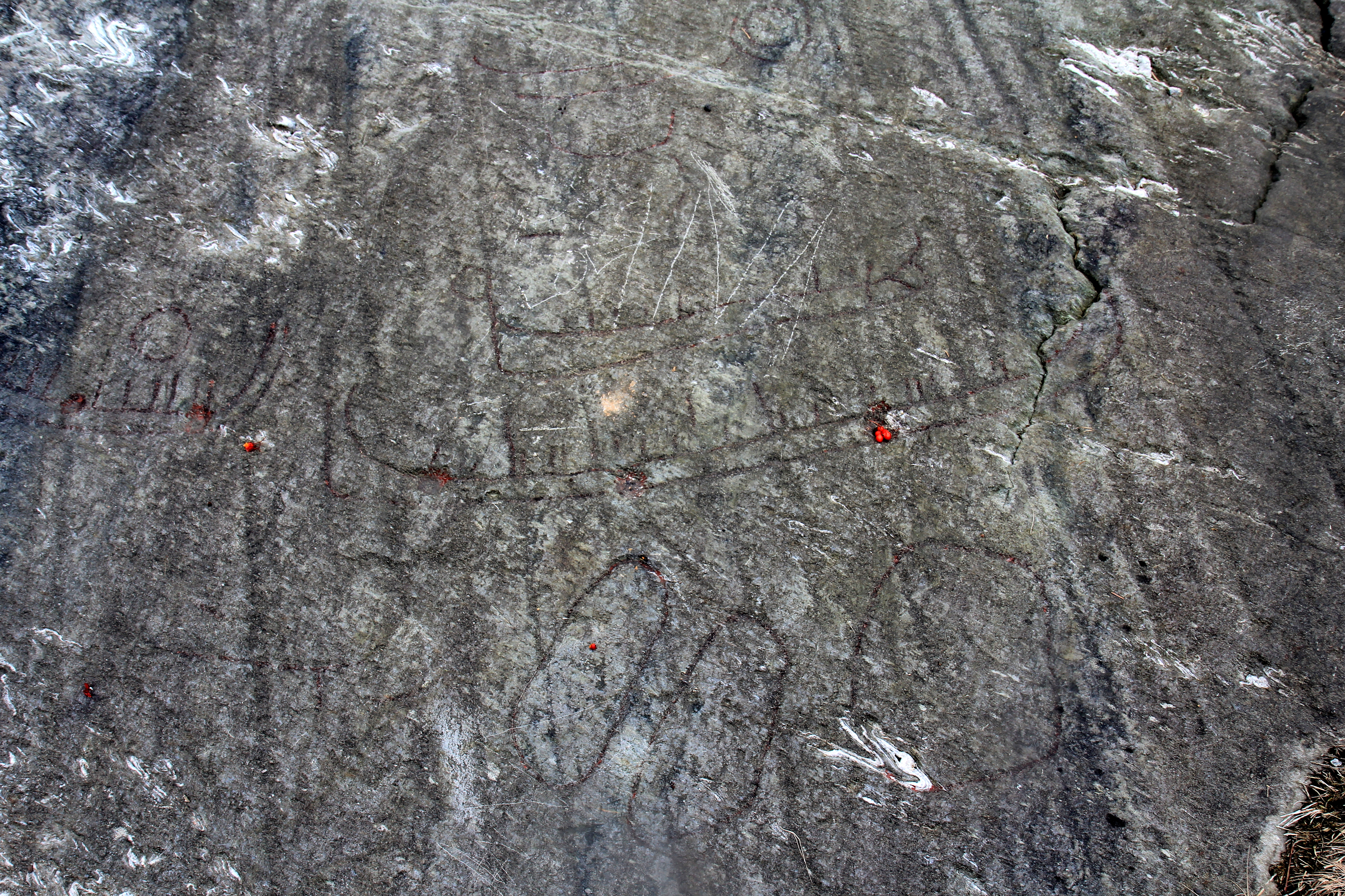 Rudlå 3, Helleristning ved Kampen i Stavanger